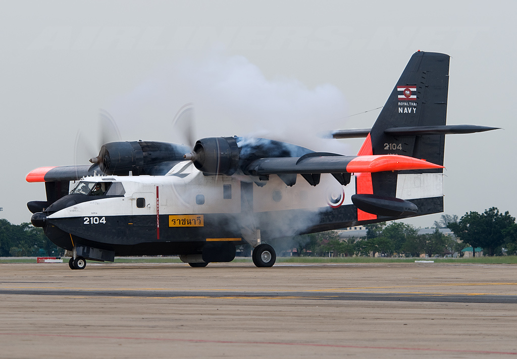 2104 (cn 1059) at Bangkok - International (Don Muang) (DMK / VTBD)